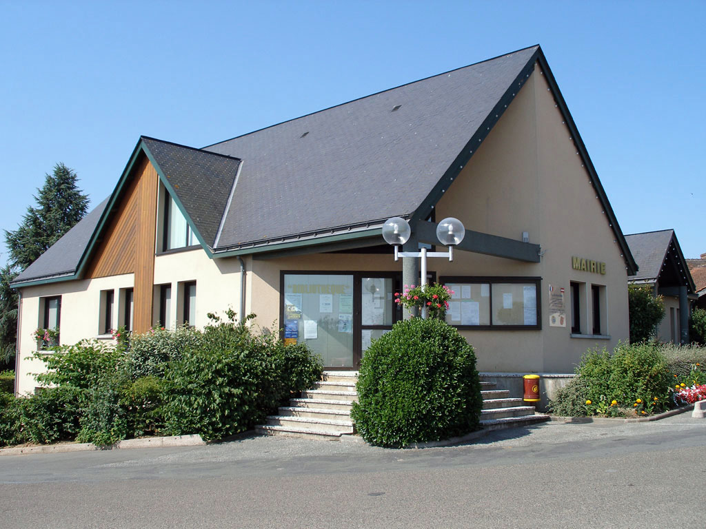 Façade extérieure de la mairie de Saint-Georges-du-Bois dans le département français de la Sarthe, en juin 2004